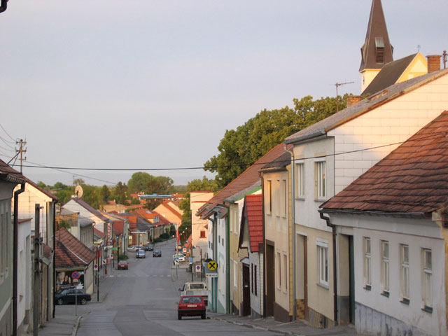 von Benutzer:Plp